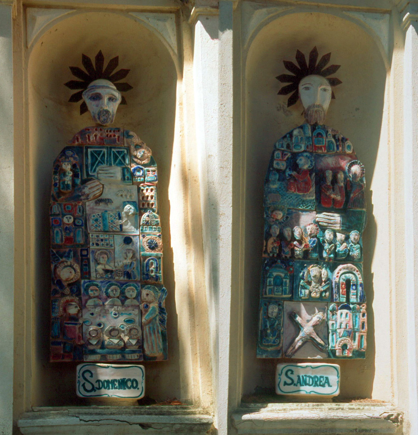 Monterosso 2004